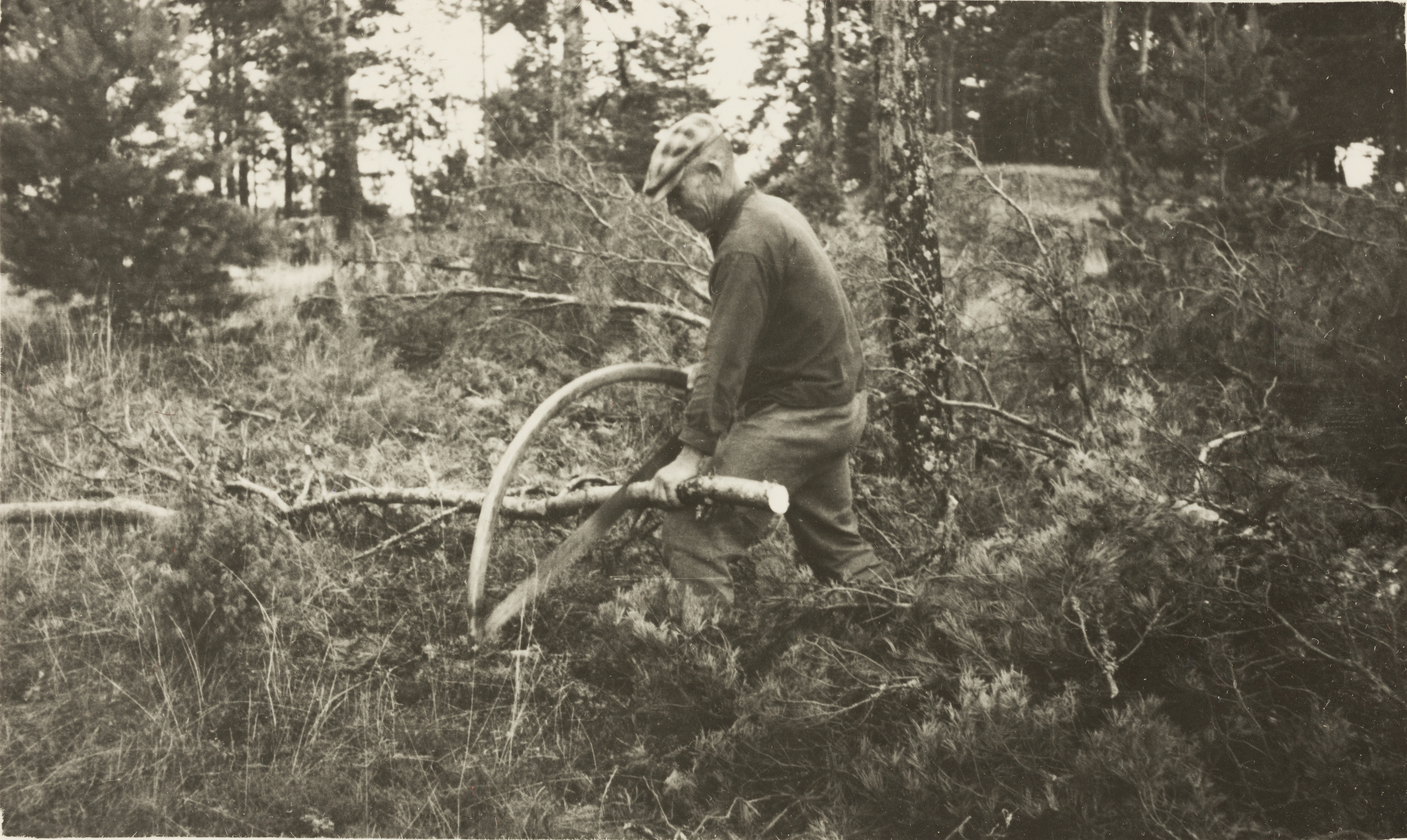 Saagimine ühemehesaega